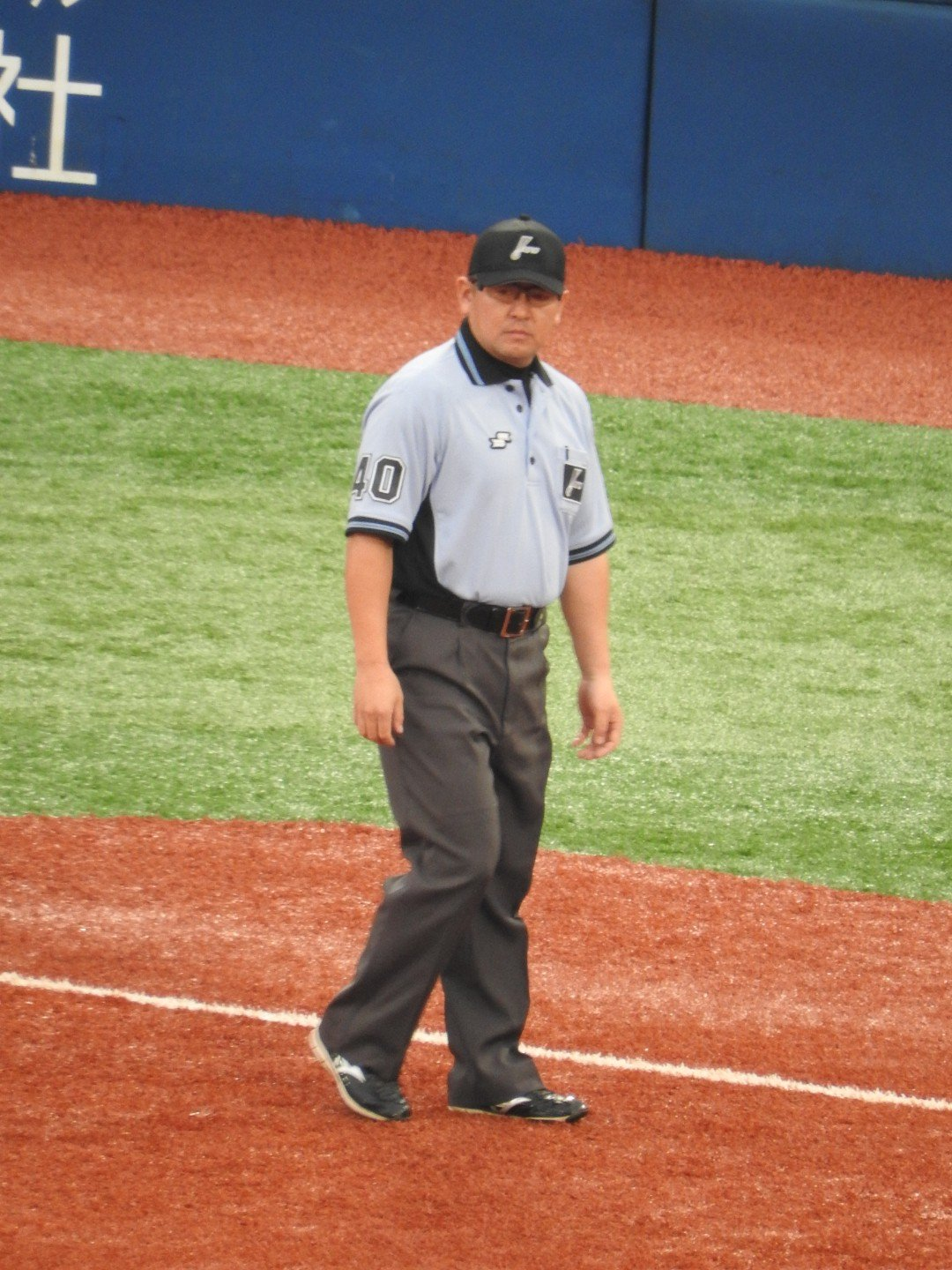 2019年7月16日横浜スタジアムにて